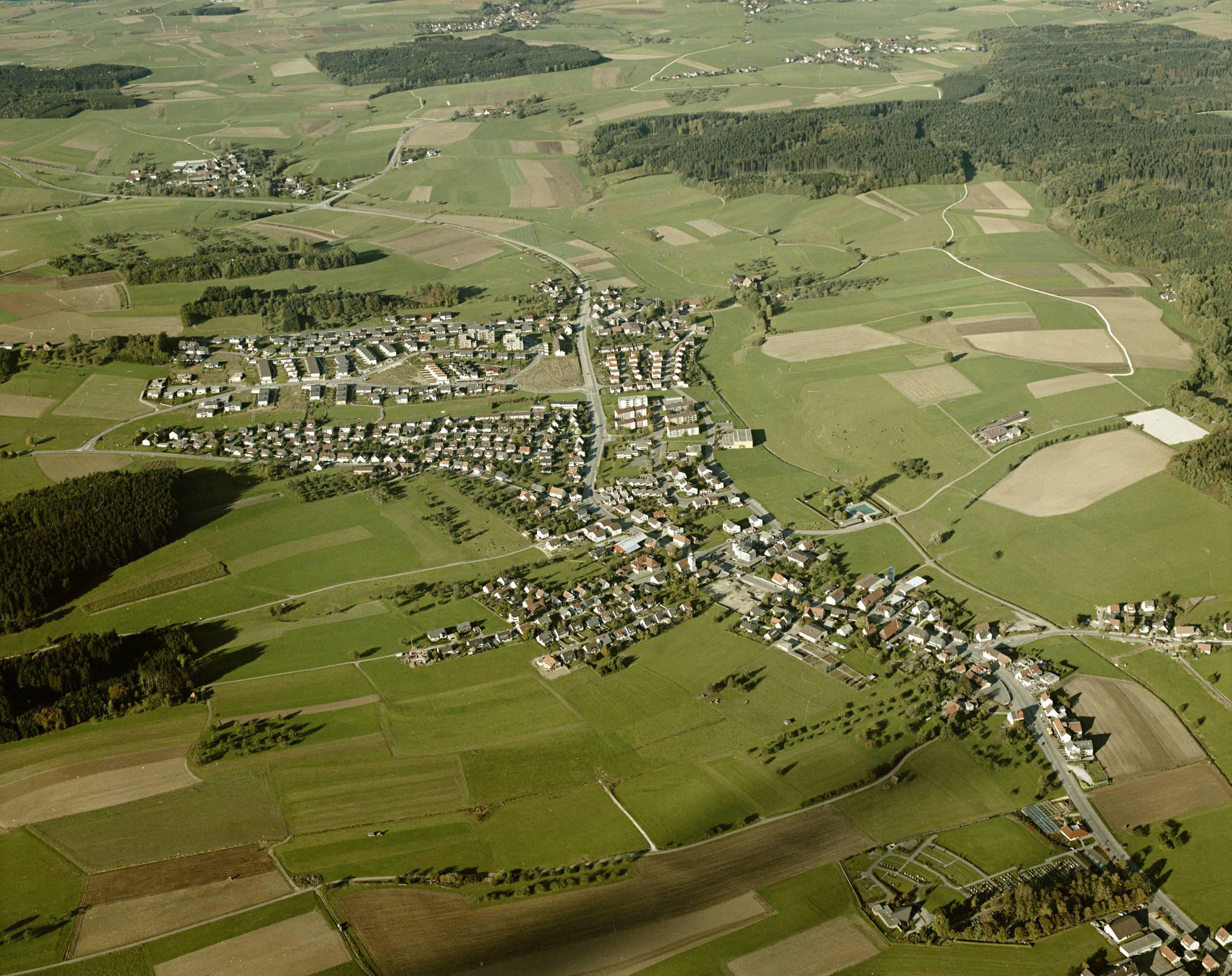 Luftbild von Unterrombach - Staatsarchiv Sigmaringen - Archivalieneinheit N 1/96 T 1 Nr. 593